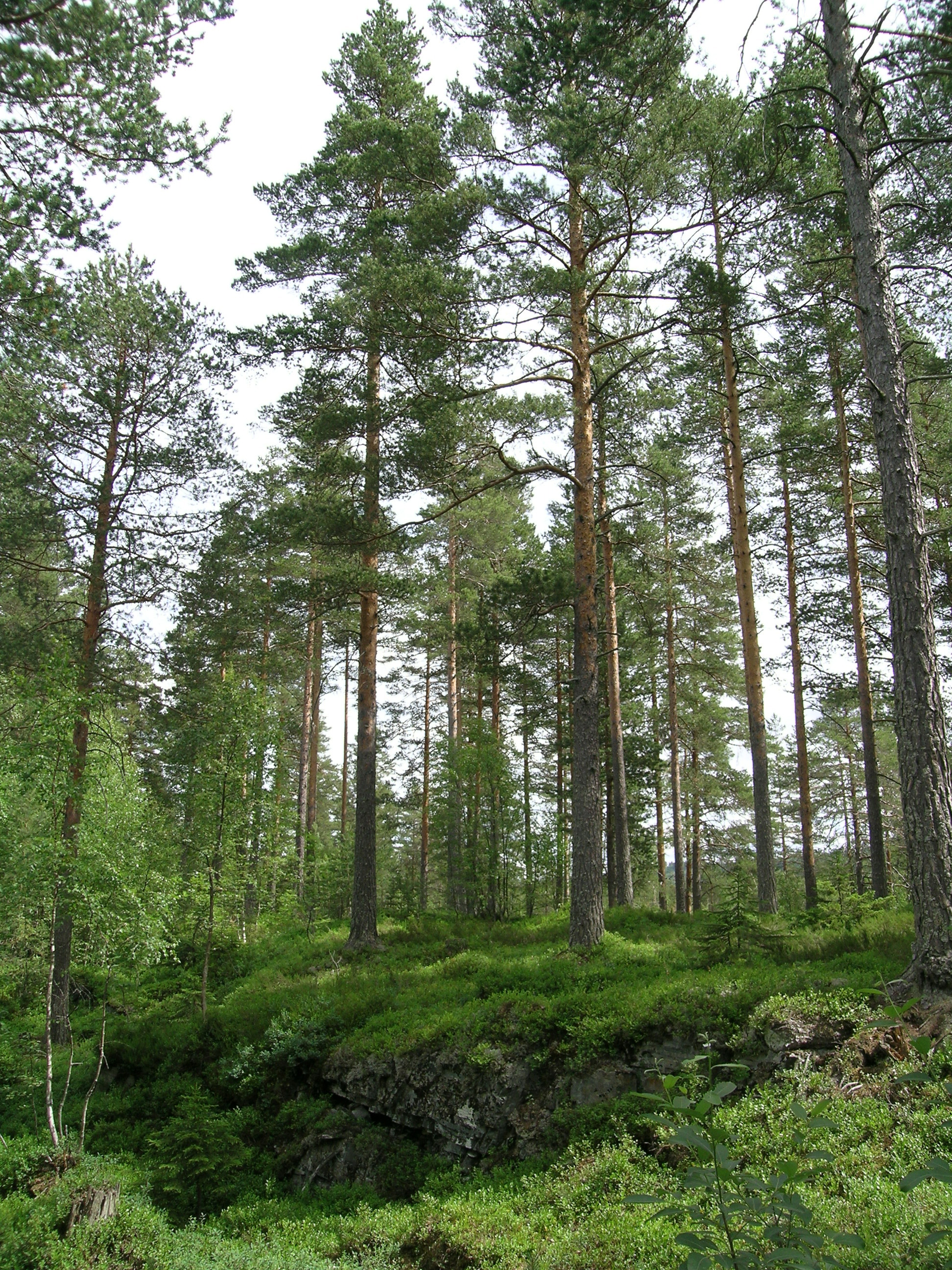 Limestone pine forest (Kalkfuruskog). Kongsberg, Norway.